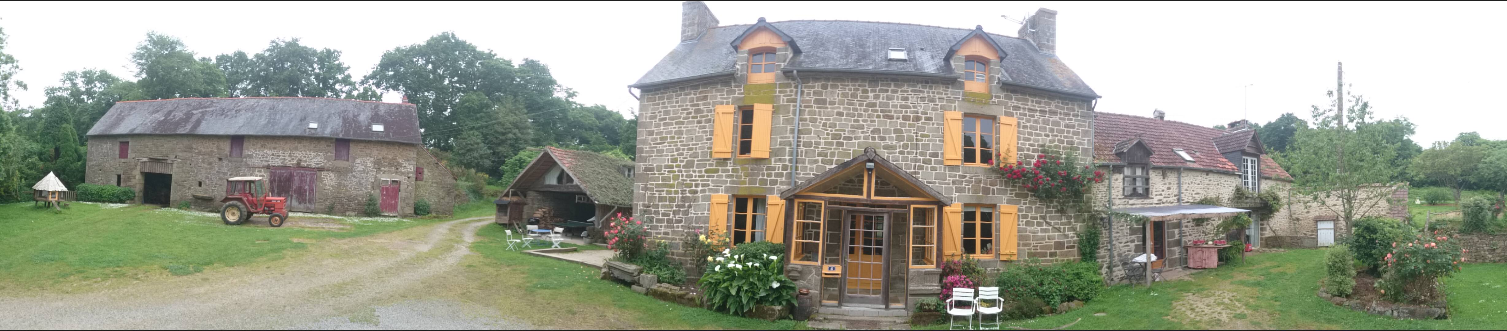 L'état actuel du corps de ferme au lieu-dit la Higourdais